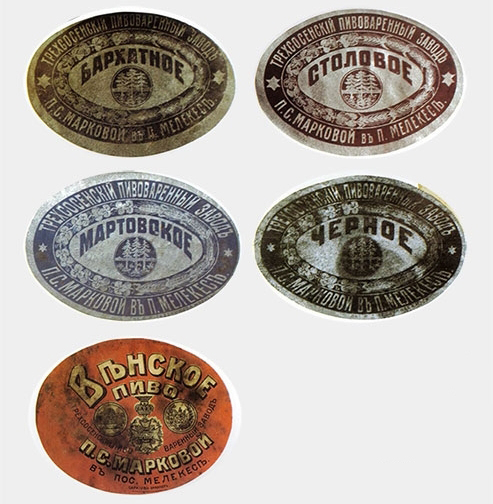 Старые этикетки завода Марковой